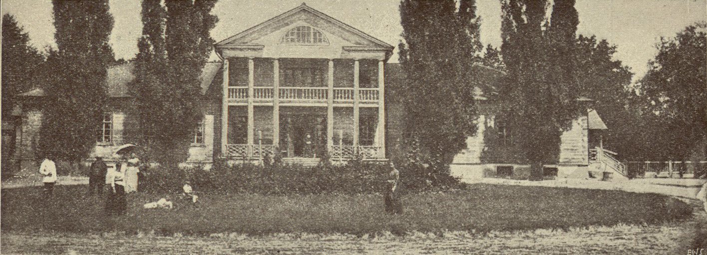 Беларуская (тарашкевіца): Малевічы (Malevičy), сядзіба Жукоўскіх (Žukoŭski)